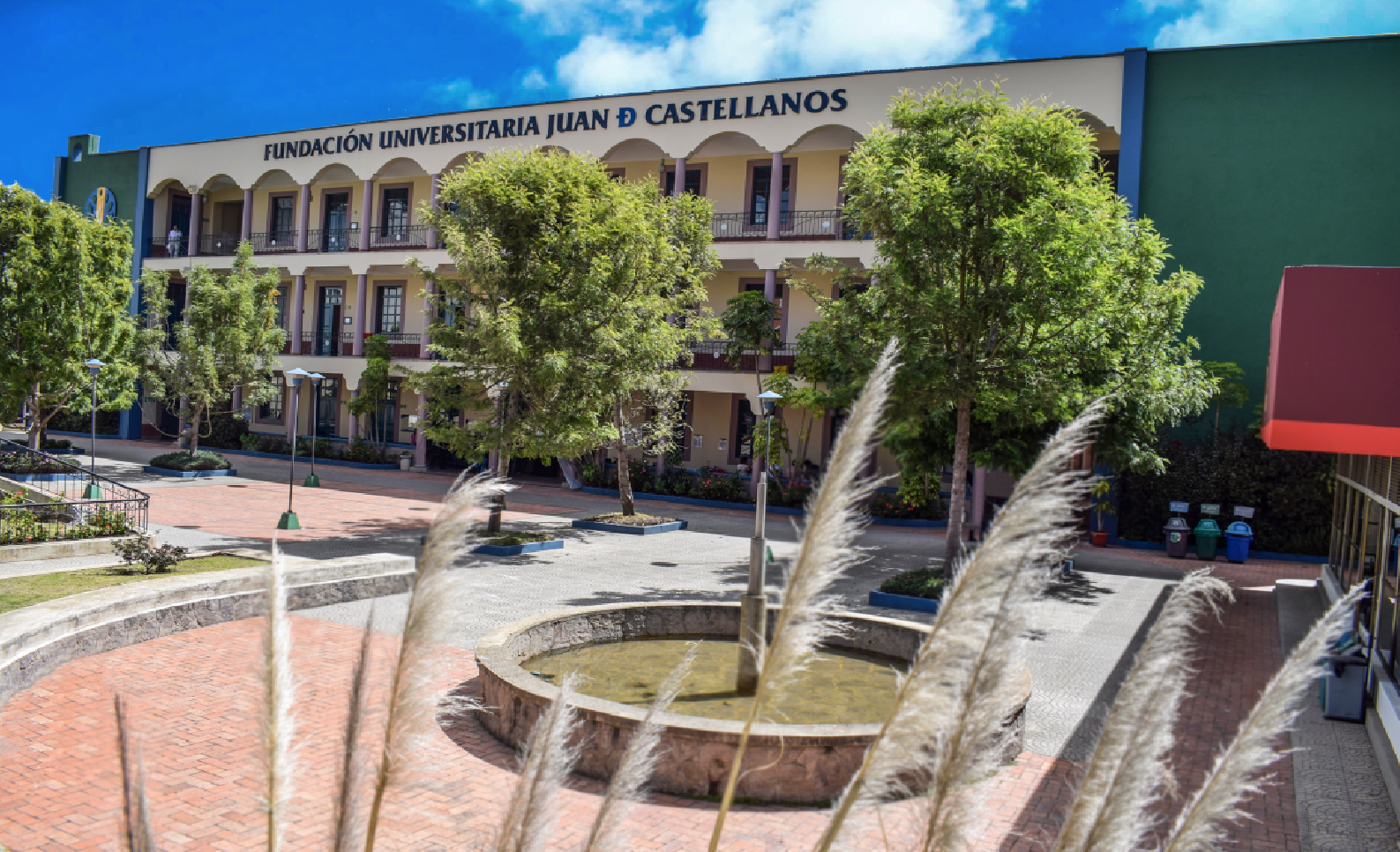 Fachada Edificio Álvaro Castillo Dueñas de la Fundación Universitaria Juan de Castellanos (Tunja, Boyacá)